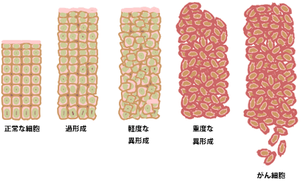 File:Cancer progression from NIH.pngの日本語バージョンです。